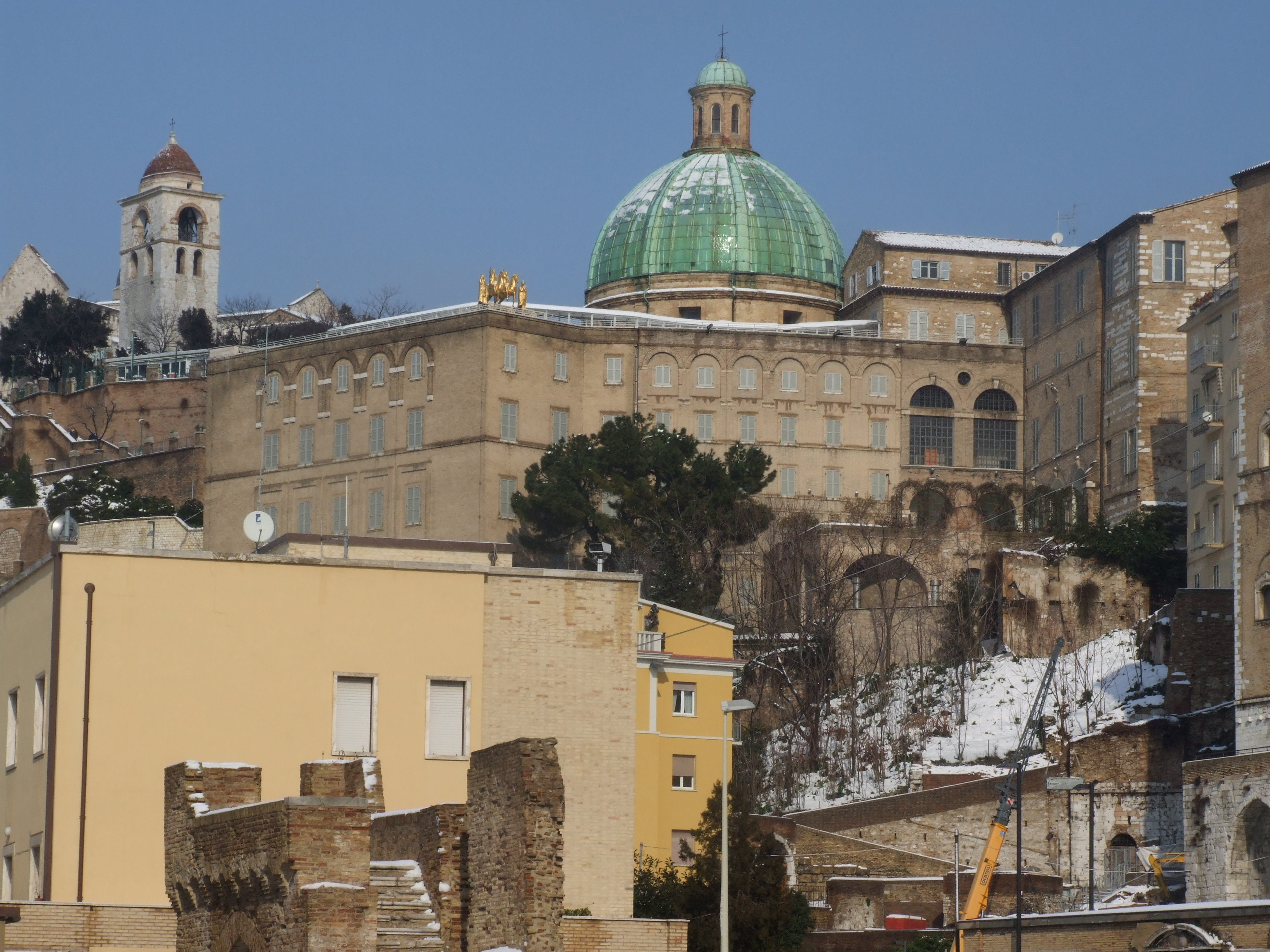 Museo Archeologico Nazionale delle Marche - MIBAC - palazzo Ferretti dall'area portuale This is a photo of a monument which is part of cultural heritage of Italy.